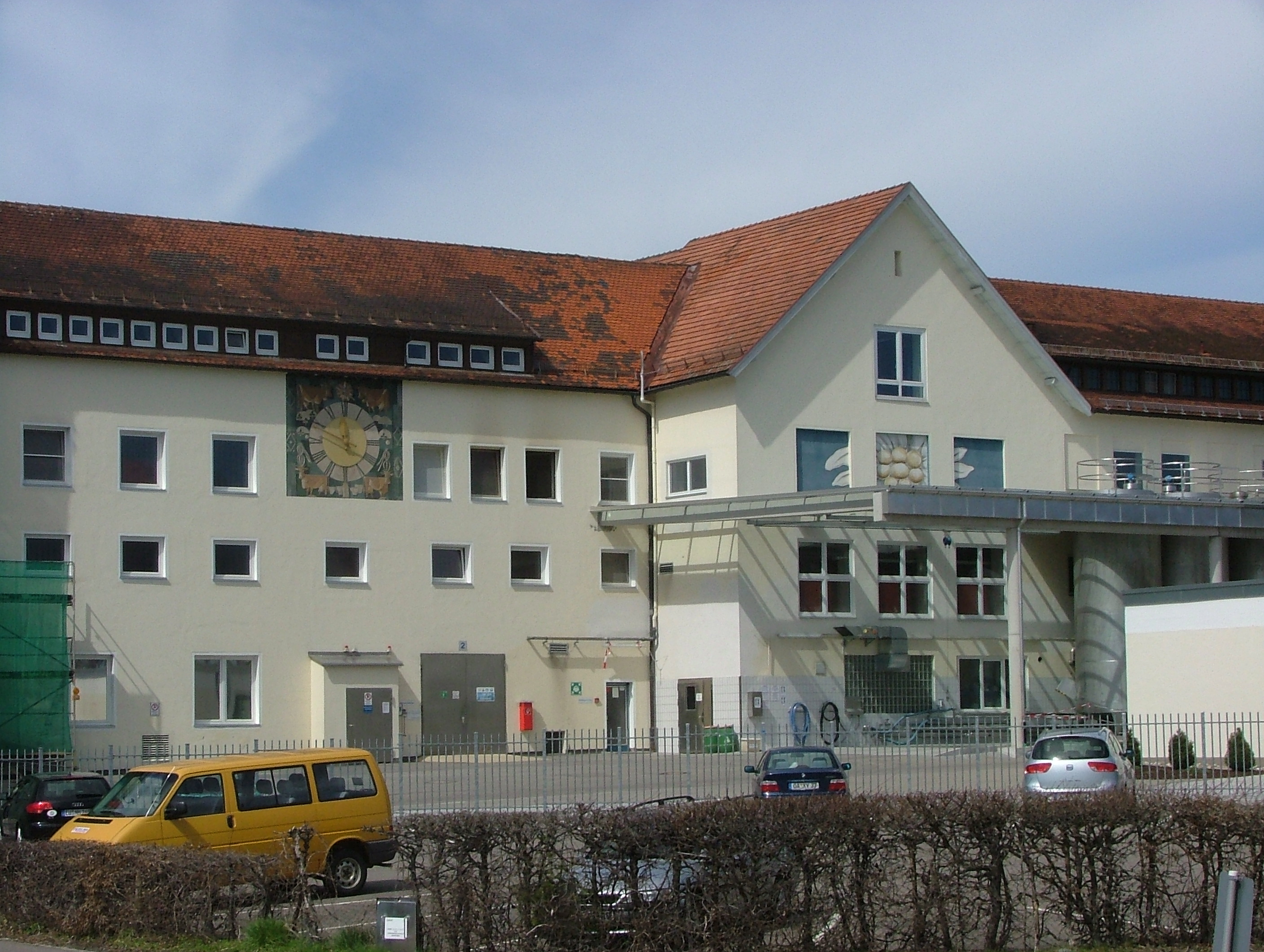 Edelweiß